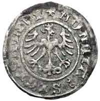 Półgrosz koronny Zygmunta Starego. Rewers. autor: mzopw